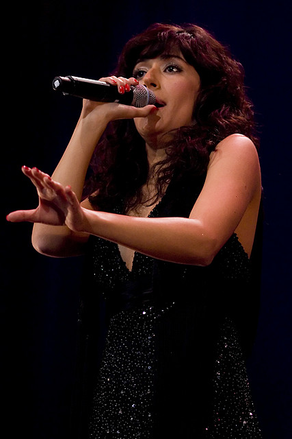 Ana Moura, fadista